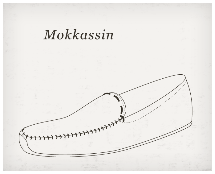 Beim Mokassin handelt es sich um einen weichen Schlupfschuh aus Leder ohne Absatz, bei dem der Schaft unter dem Fuß herumgeführt wird